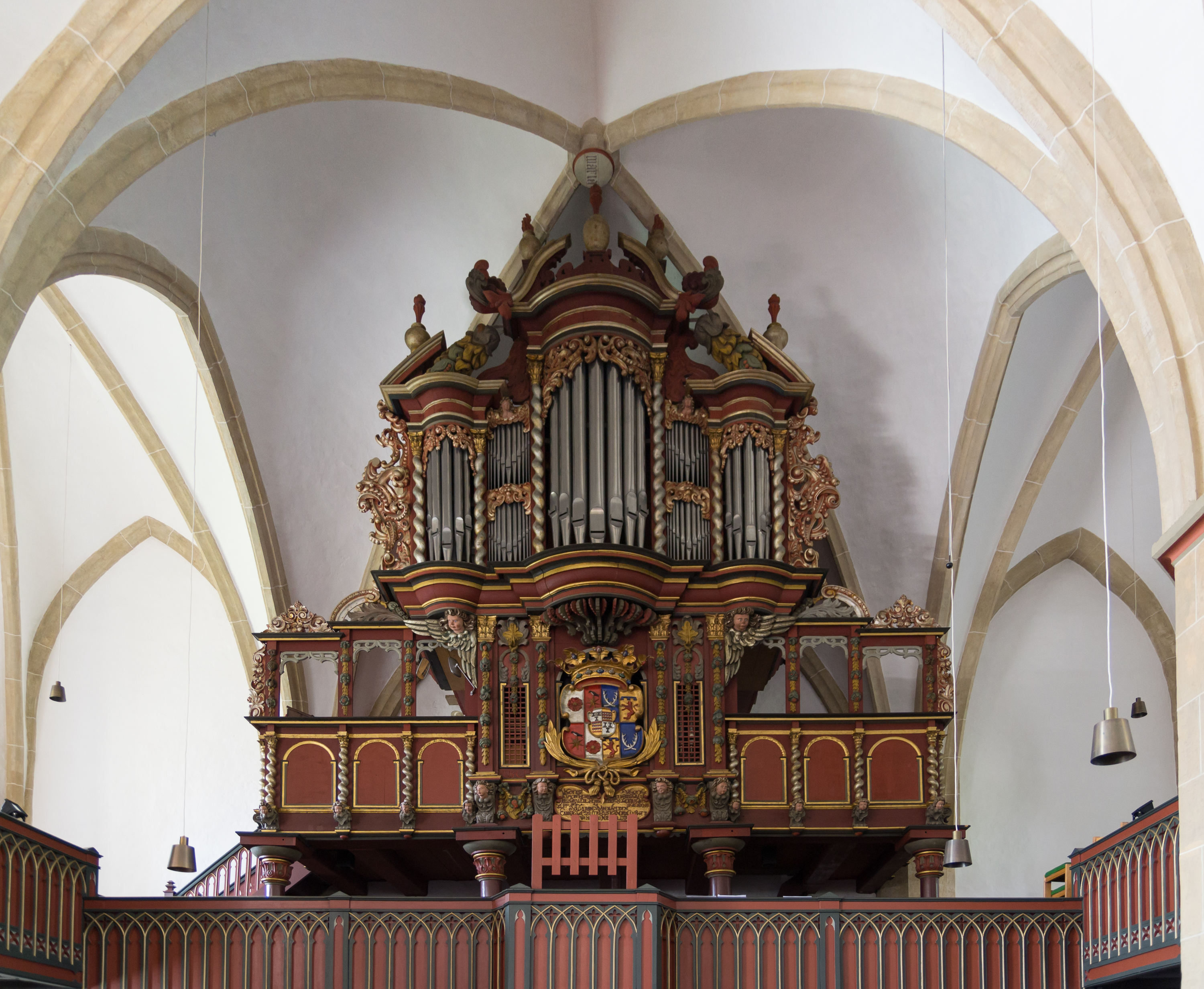 Orgel der evangelisch-reformierten Alexanderkirche in Oerlinghausen